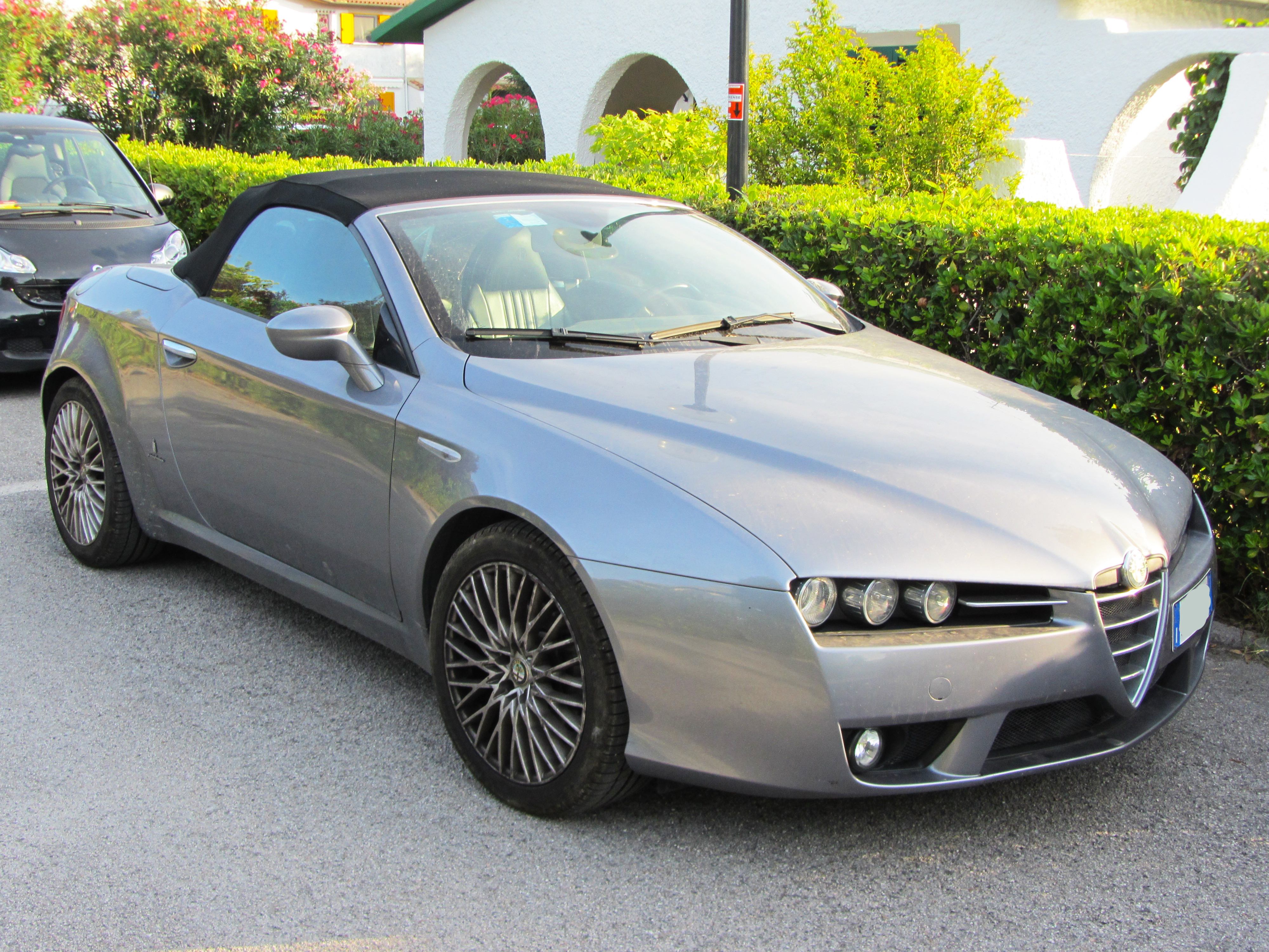 Una Alfa Romeo Spider del 2006 in un villaggio vacanze turistico a Porto Recanati